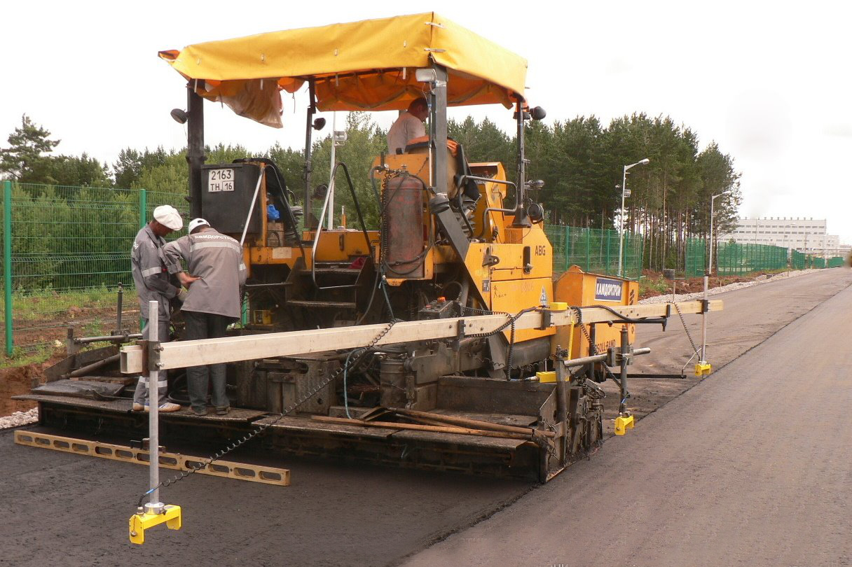 Укладку дорожного покрытия производит компания «Камдорстрой». На правый лонжерон плиты укладчика Demag DF 135C установлена несущая балка с тремя ультразвуковыми датчиками Sonic-Ski.